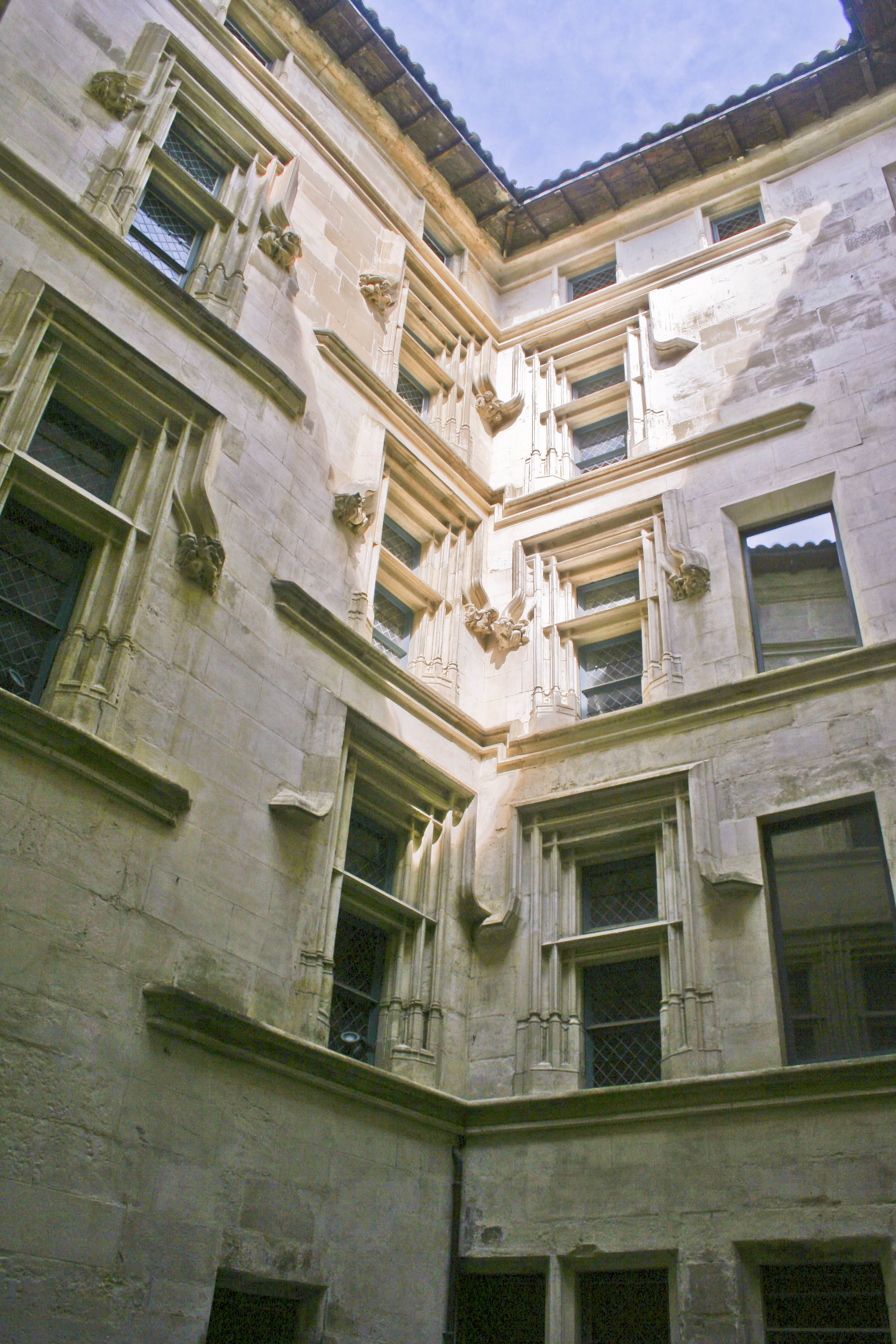 Maison des Têtes, cour intérieure, à Valence (Drôme, France)